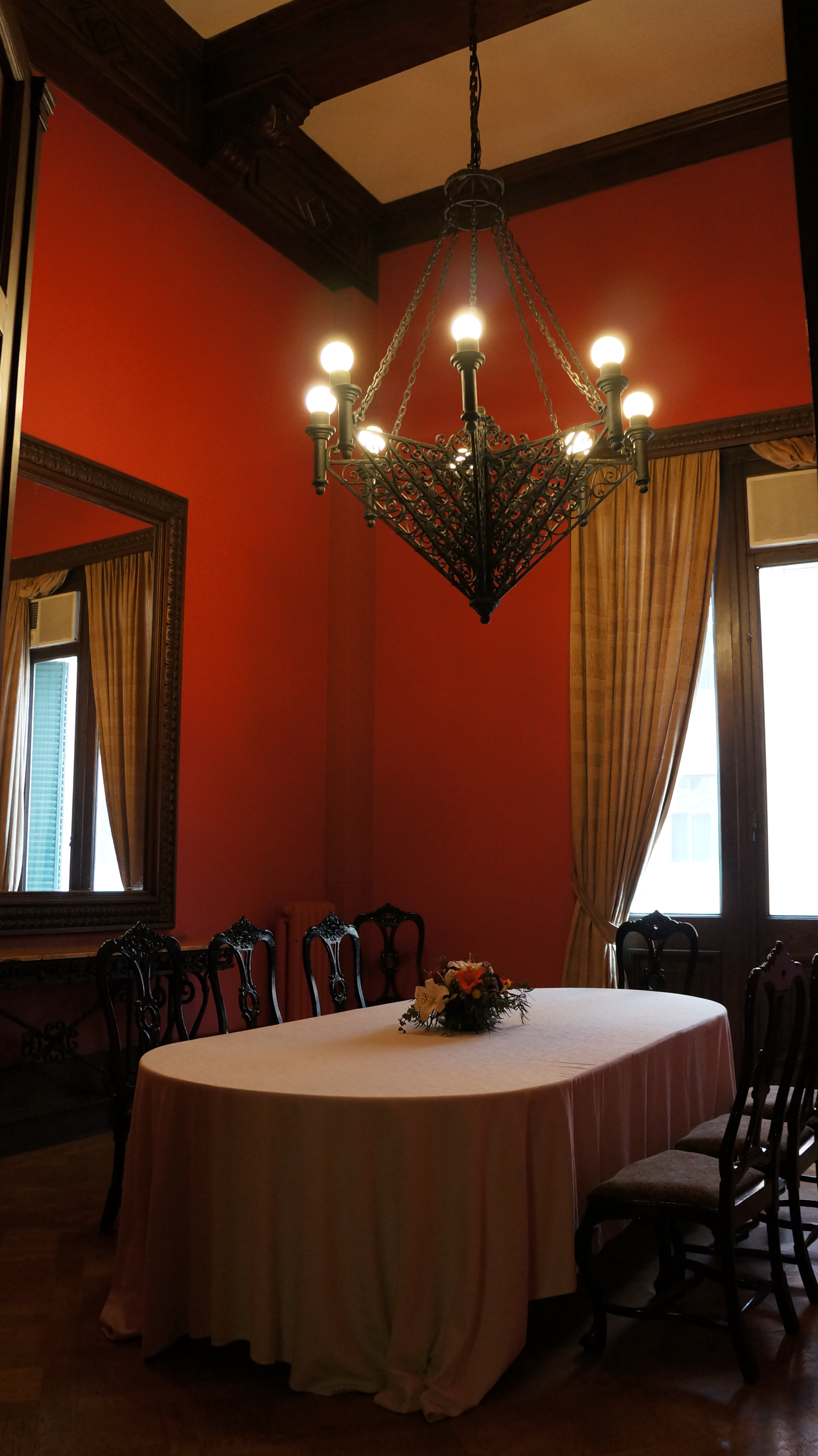 Club de la Unión.